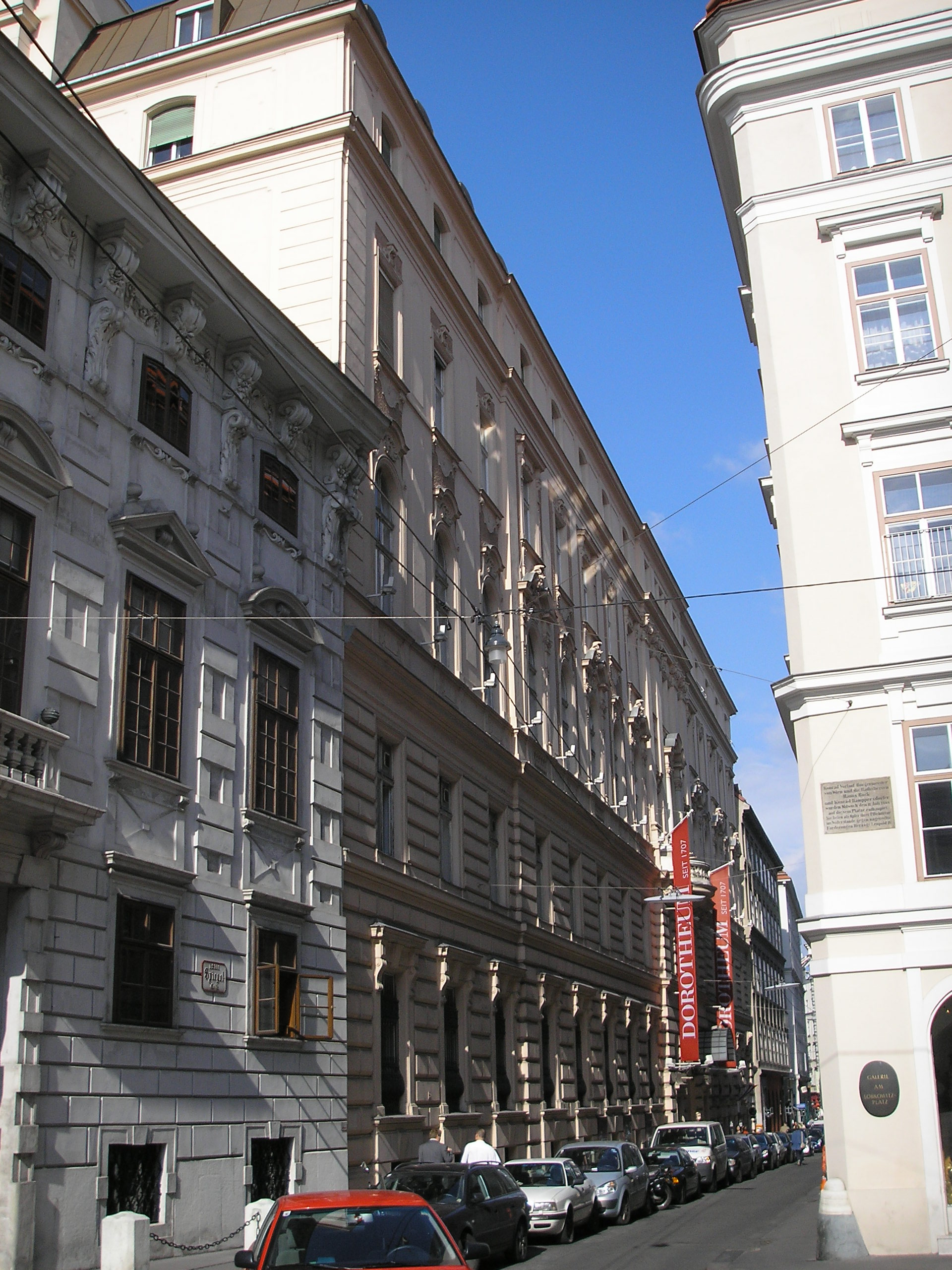 Palais Dorotheum in Vienna.